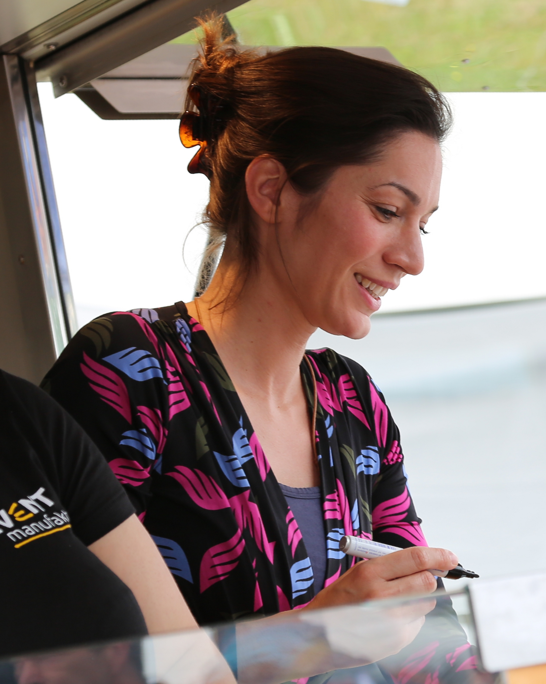 Samantha Viana beim Verkauf beim "Rote Rosen"-Fantag 2017, am 18.06.2017 in Lüneburg.